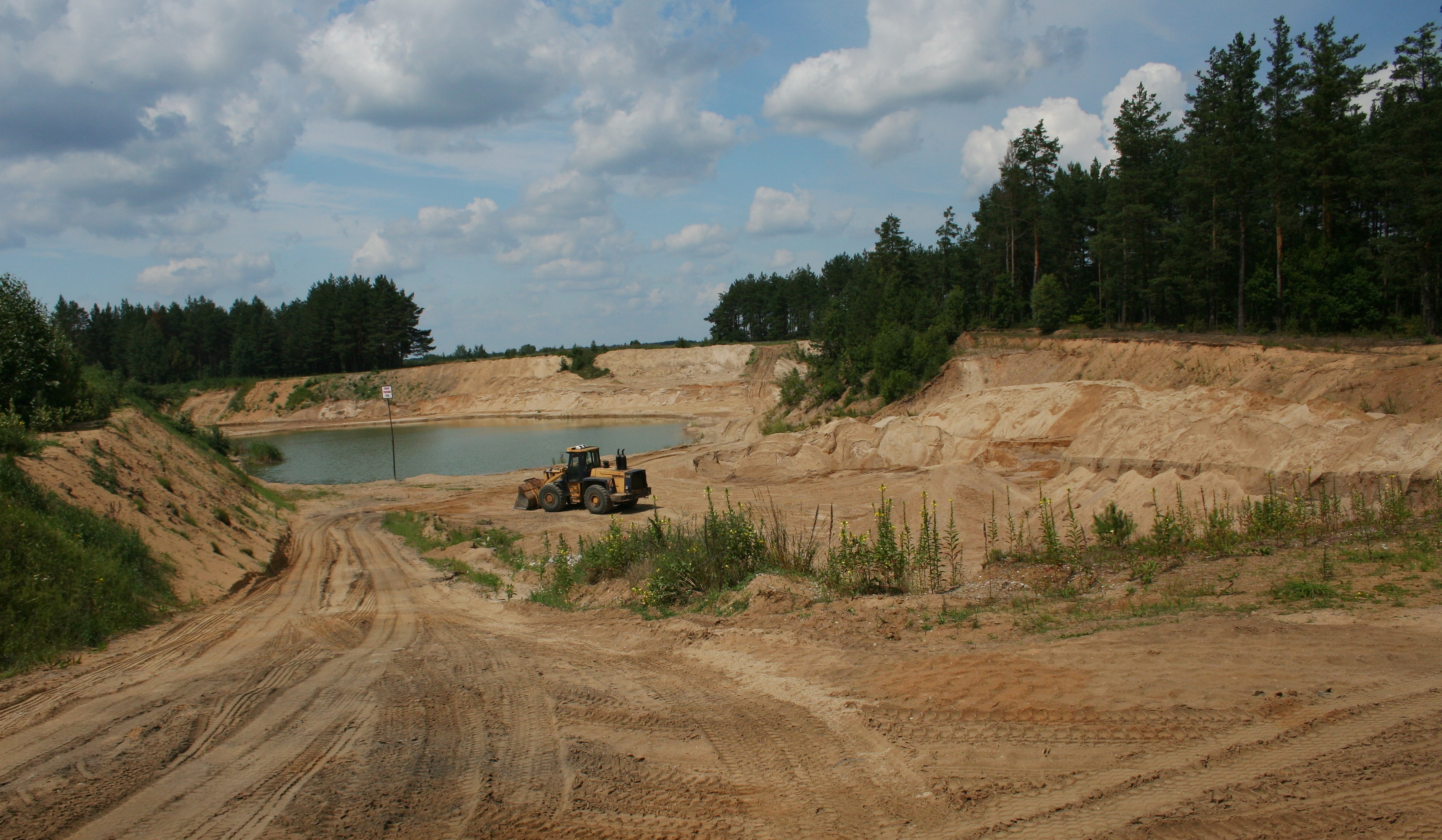 Żwirownia we wsi Waniewo, gmina Narew, woj. podlaskie od strony miejscowości Gorędy